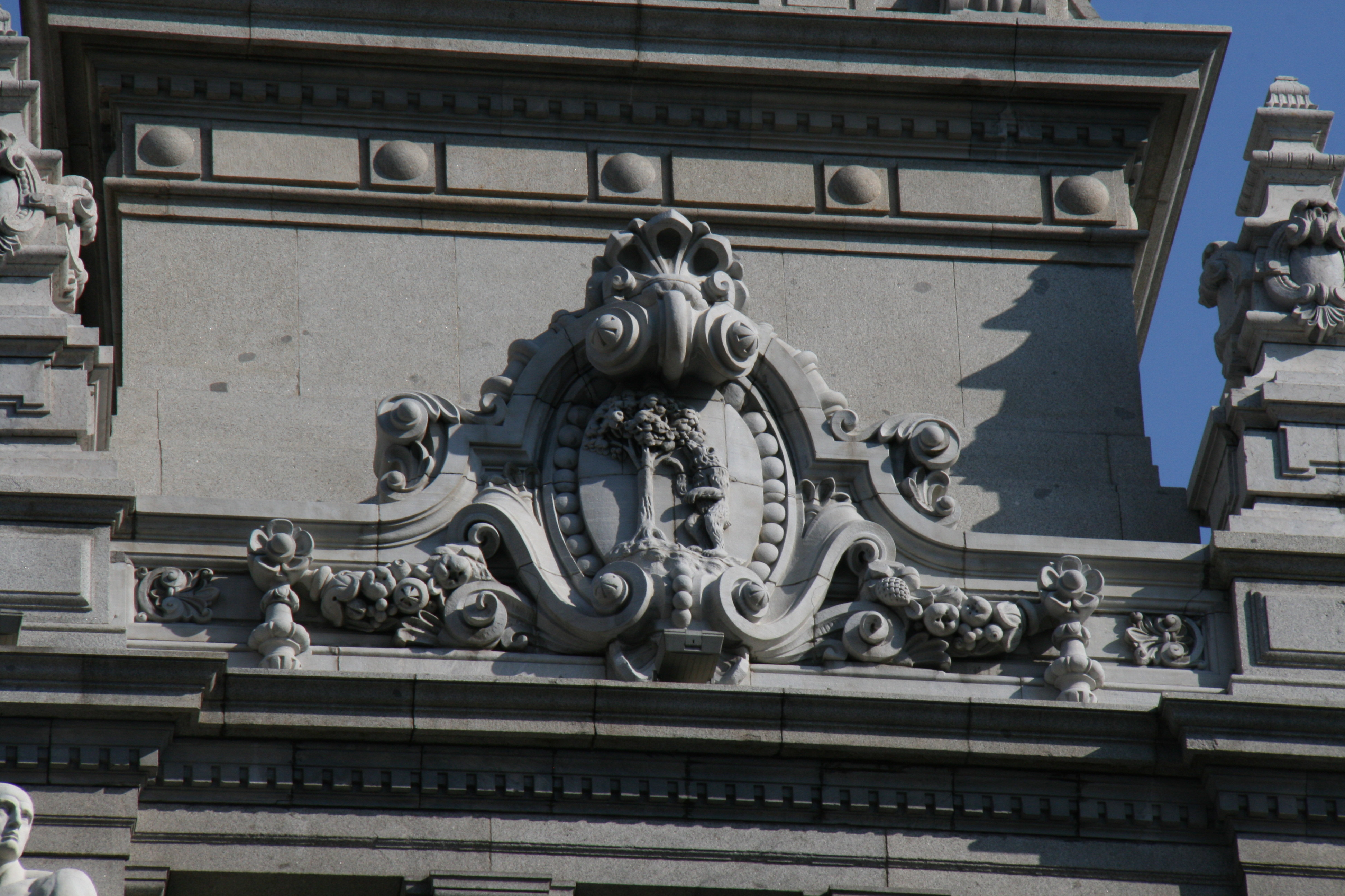 Armas de la ciudad en el edificio de BBVA en calle de Alcalá 45